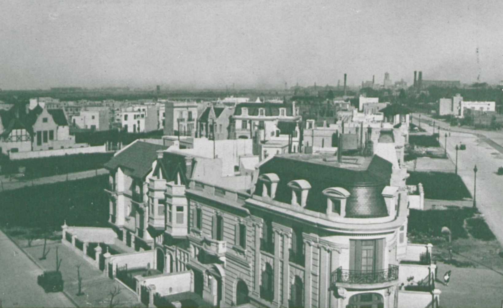 Vista del Palacio Tezanos Pinto en Palermo Chico